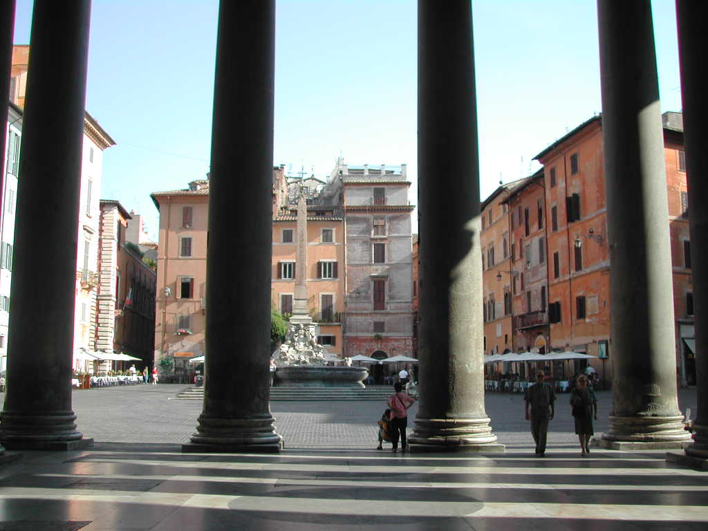 Roma, piazza della Rotonda dal Pantheon.